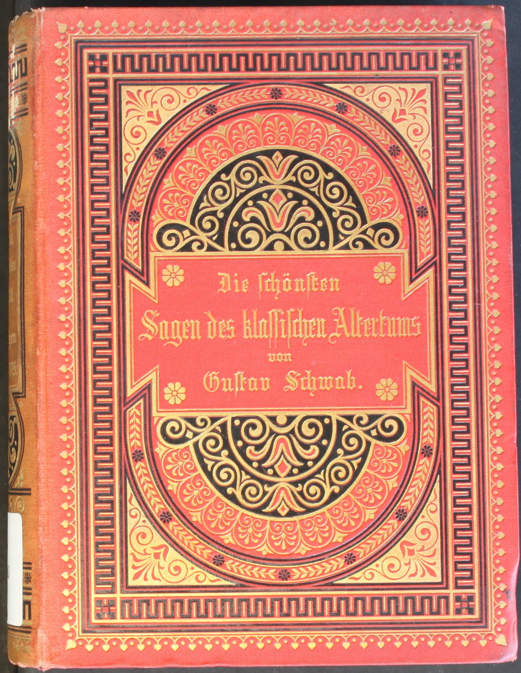 Einband der 14. Auflage von Gustav Schwab: Die schönsten Sagen des klassischen Altertums. Herausgegeben von Gotthold Klee. Gütersloh, Bertelsmann-Verlag